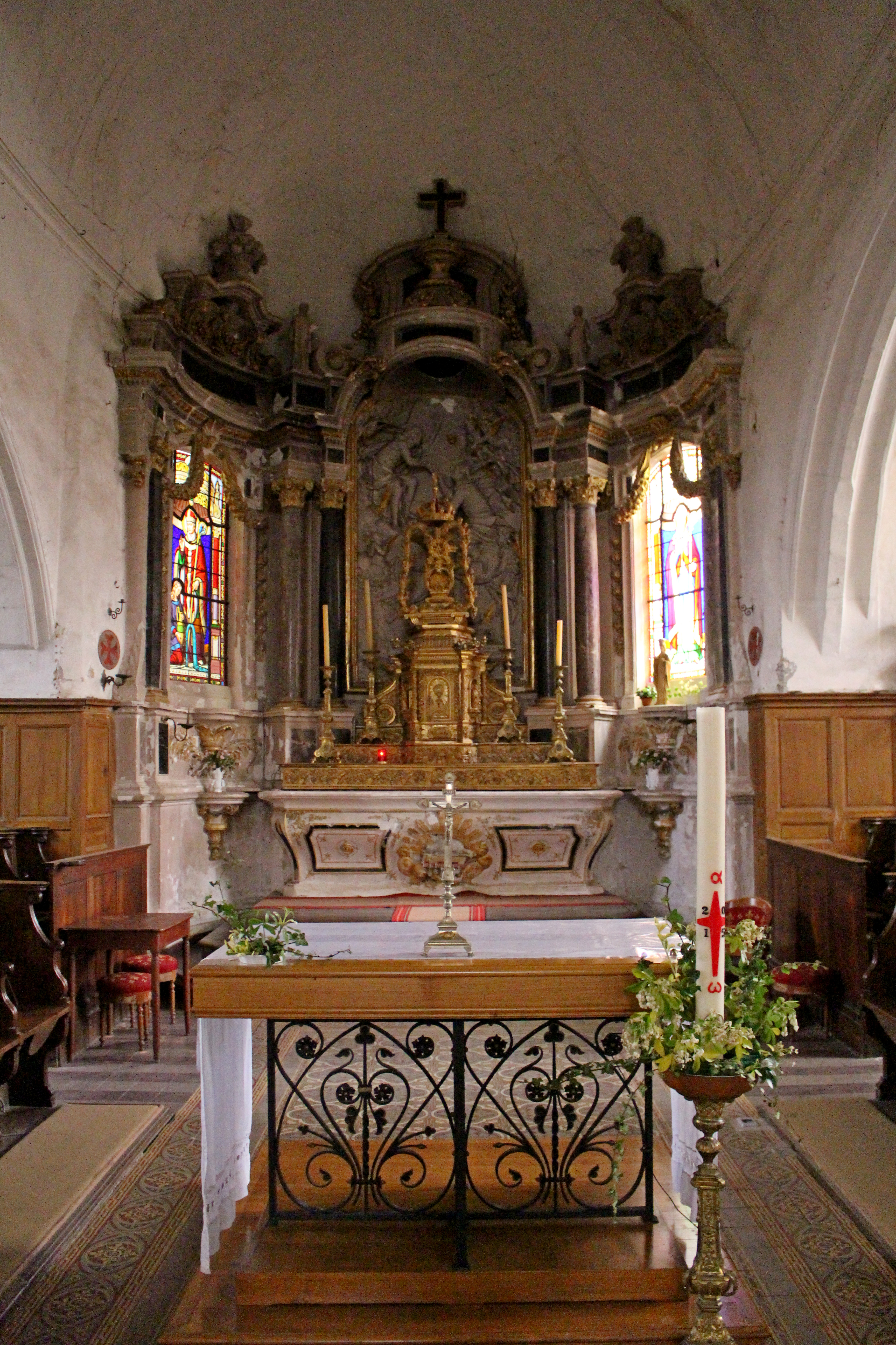 Église Notre-Dame-de-l'Assomption de Livré-la-Touche .